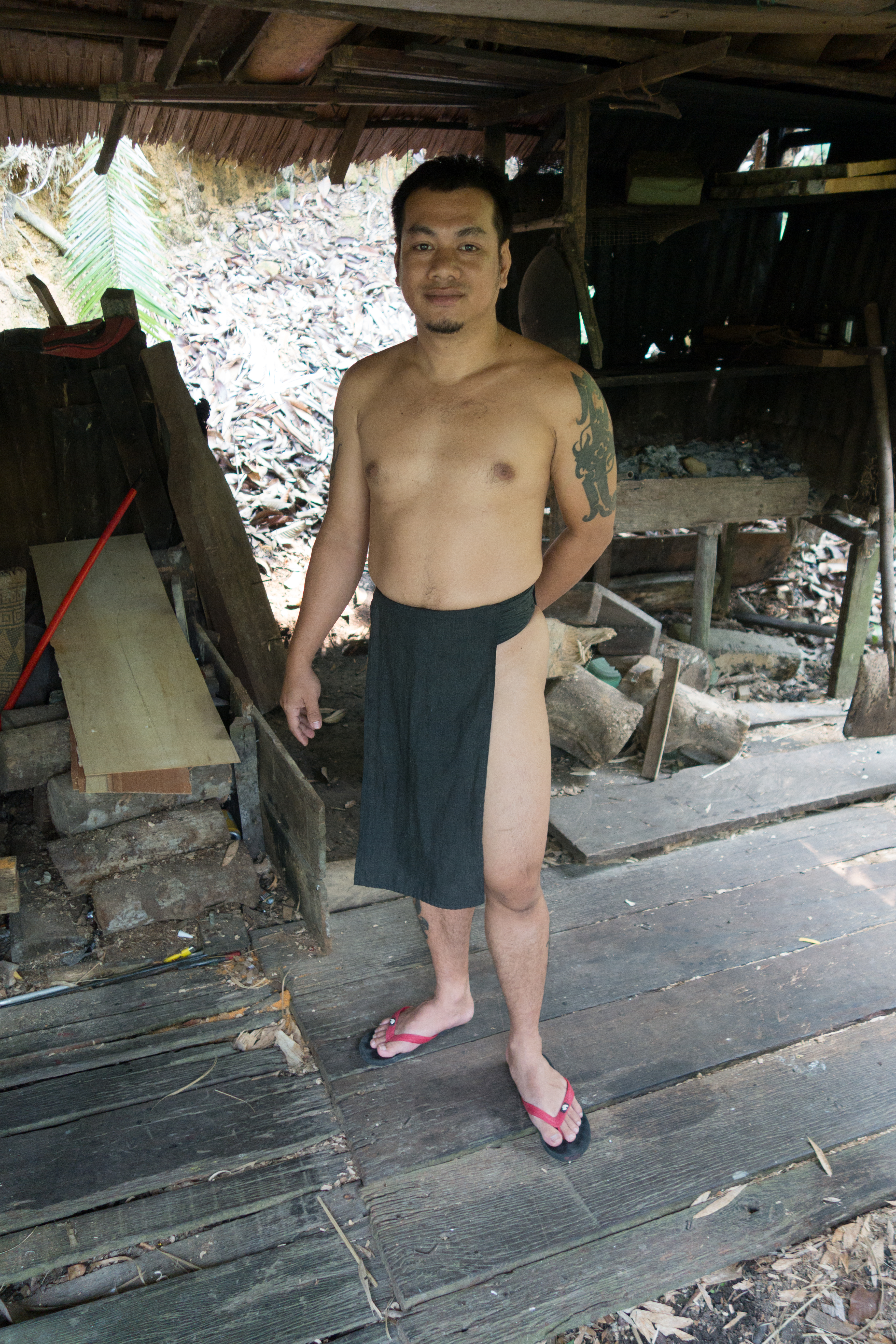 Sarawak Cultural Village, Borneo, Malaysia